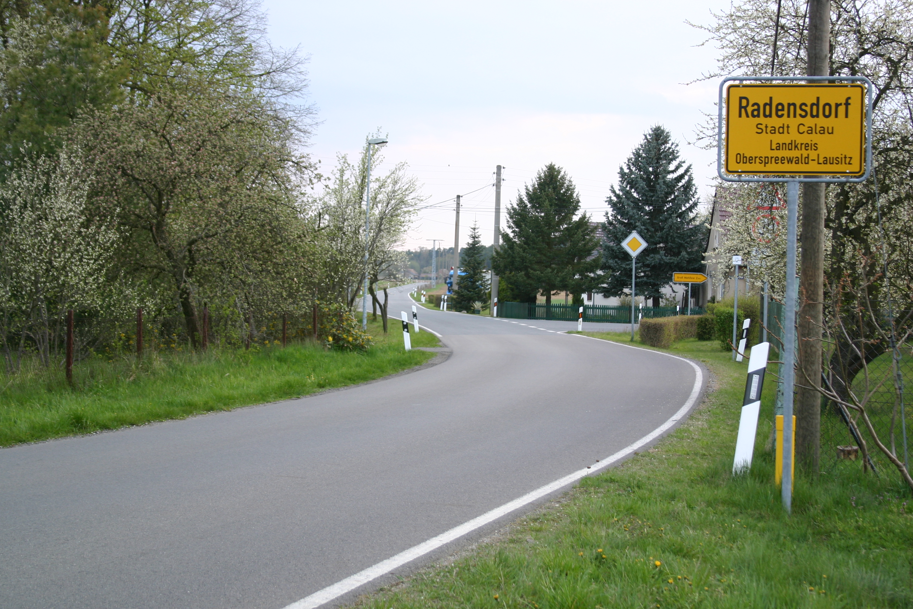 RadensdorfIMG 9058